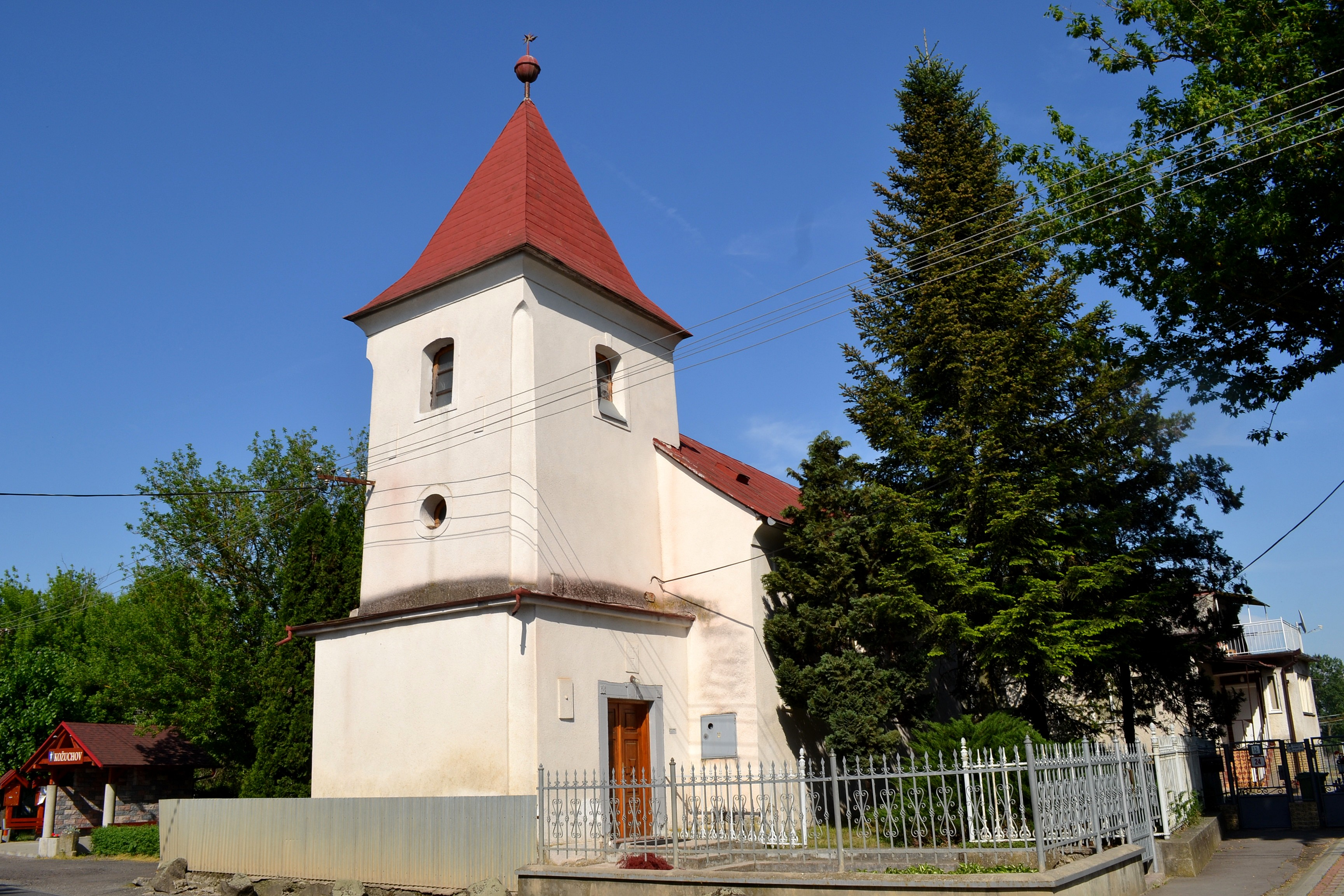 Kožuchov (okr. Trebišov), kostol reformovanej cirkvi; celkový pohľad